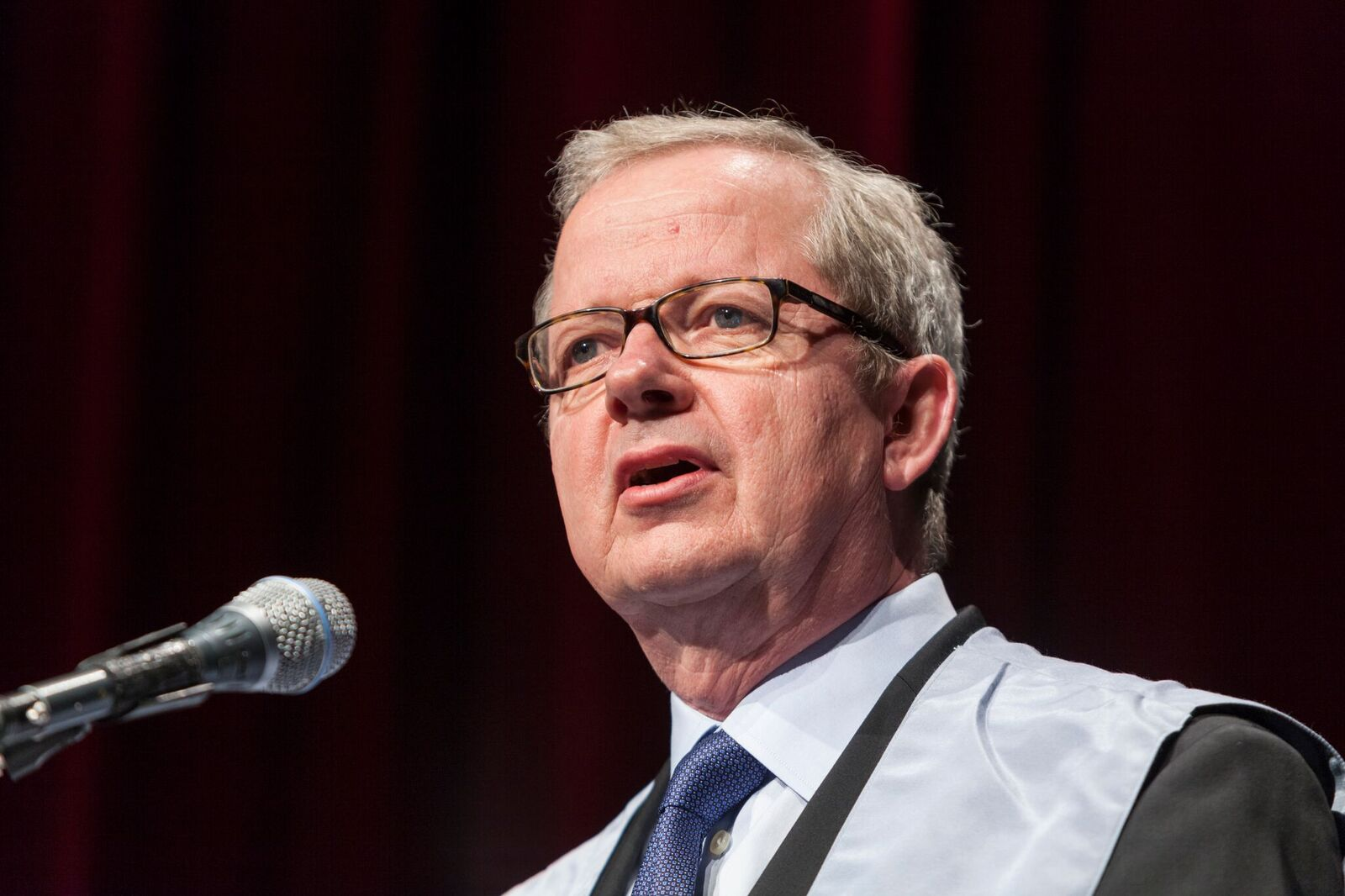 Den danske fysiker og kjemiker Jens Kehlet Nørskov i Trondheim 2012, da han ble kreert som æresdoktor ved NTNU